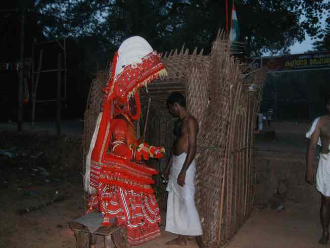 വയനാട്ടു കുലവൻ തെയ്യം